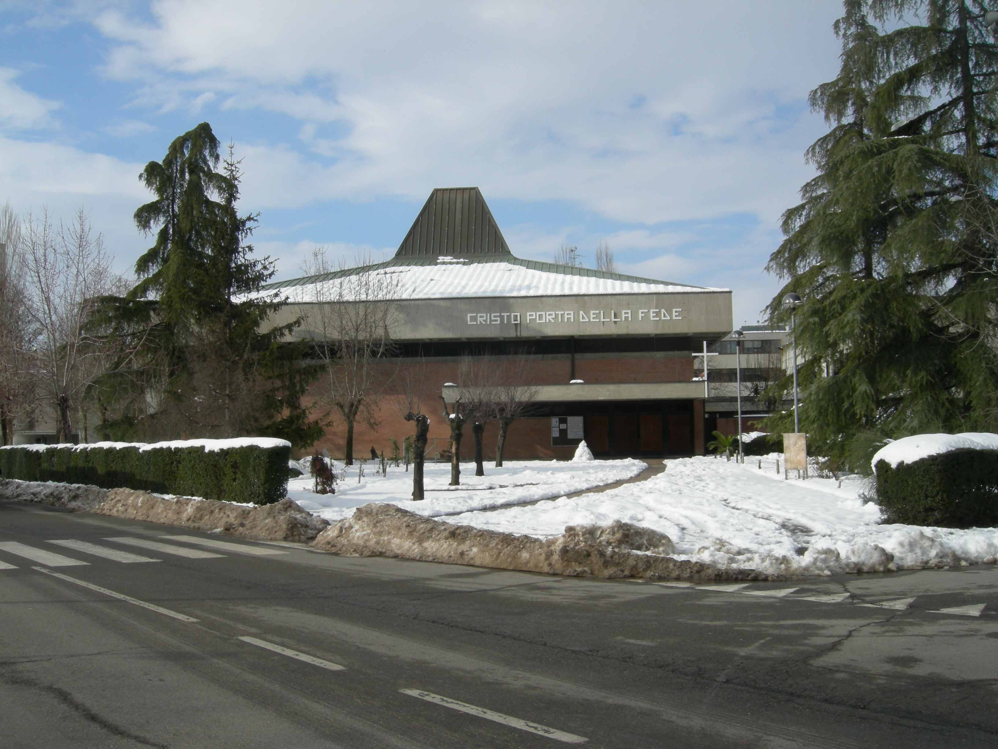 Chiesa di Santa Caterina da Bologna, Bologna-Pilastro. Progetto di Luigi Vignali, 1980-1984